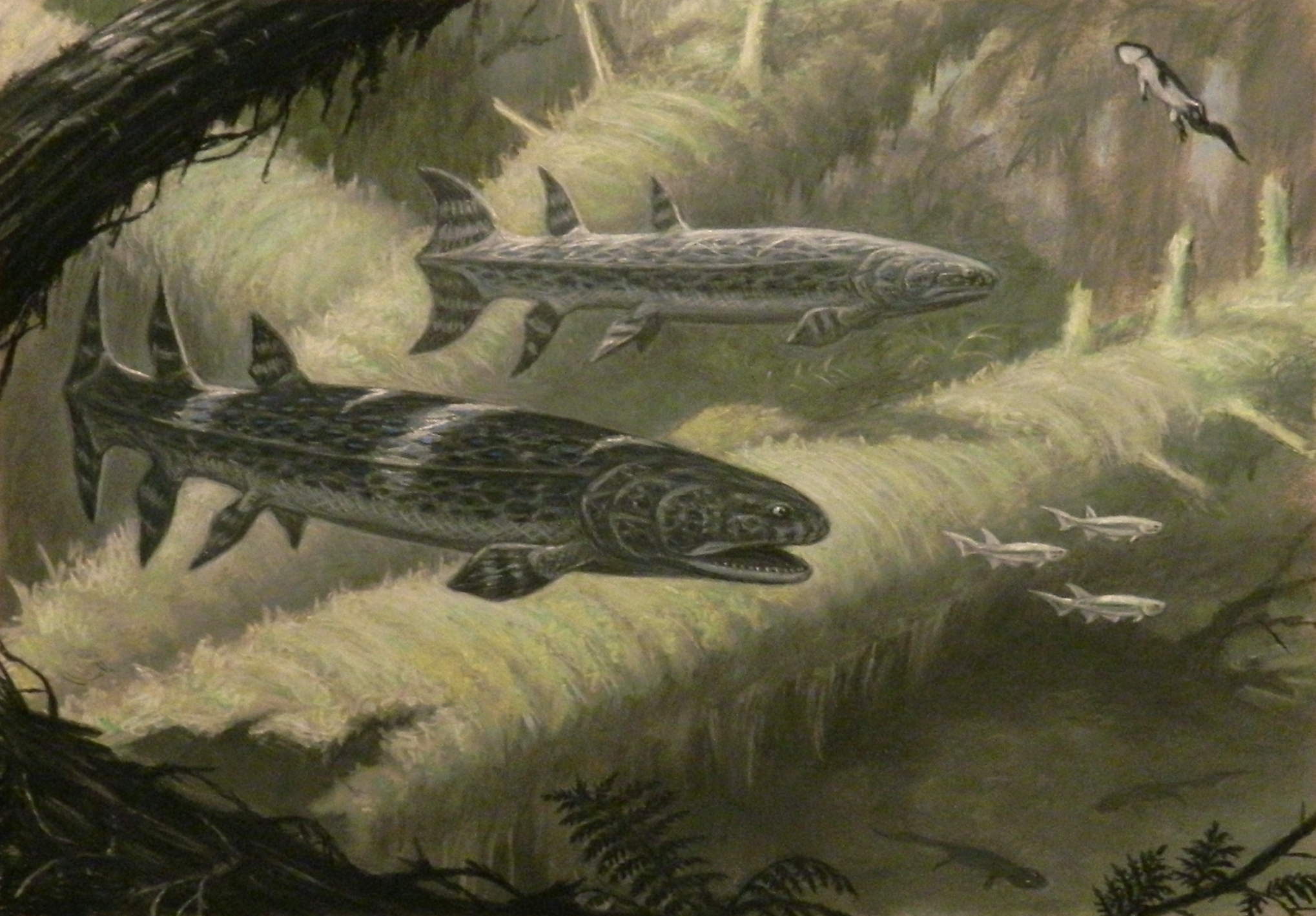 Hyneria.